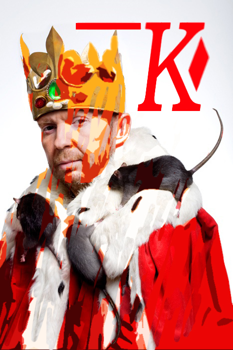 Dariusz Zawiślak (ur. 25 lipca 1972 w Warszawie) - scenarzysta, scenograf, reżyser, producent filmowy i telewizyjny. Członek, założyciel Polskiej Akademii Filmowej.